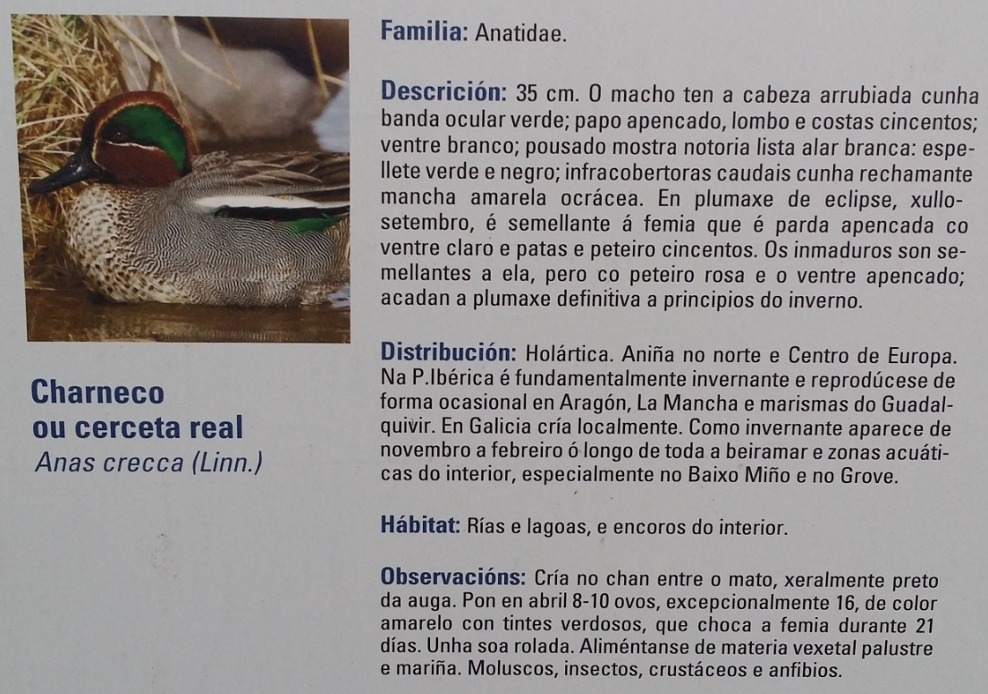 Cartaz explicativo sobre o Charneco na vila de Caión.